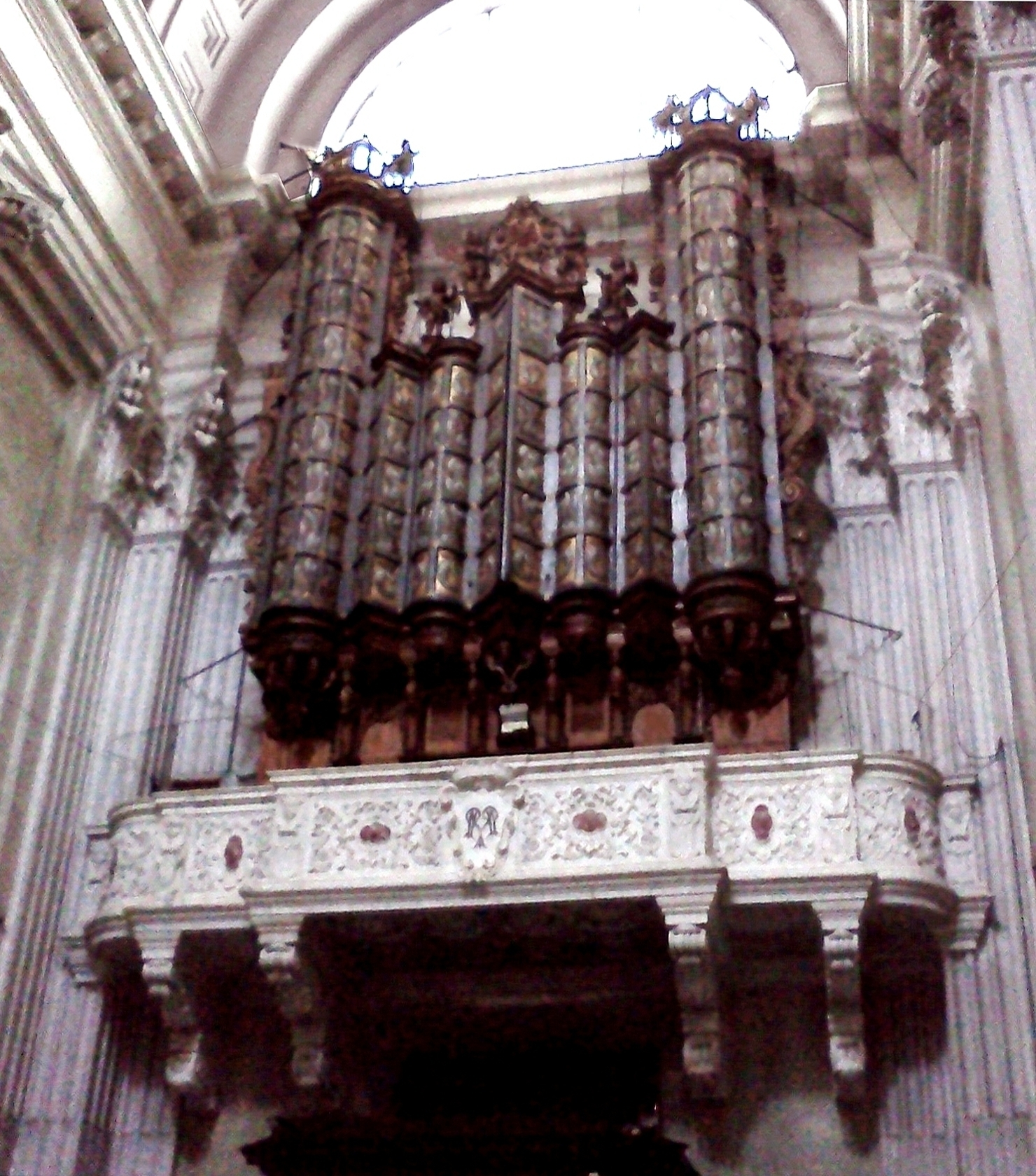 L'organo Hermans-Bianchi-Lingiardi della basilica di Santa Maria Assunta di Carignano a Genova